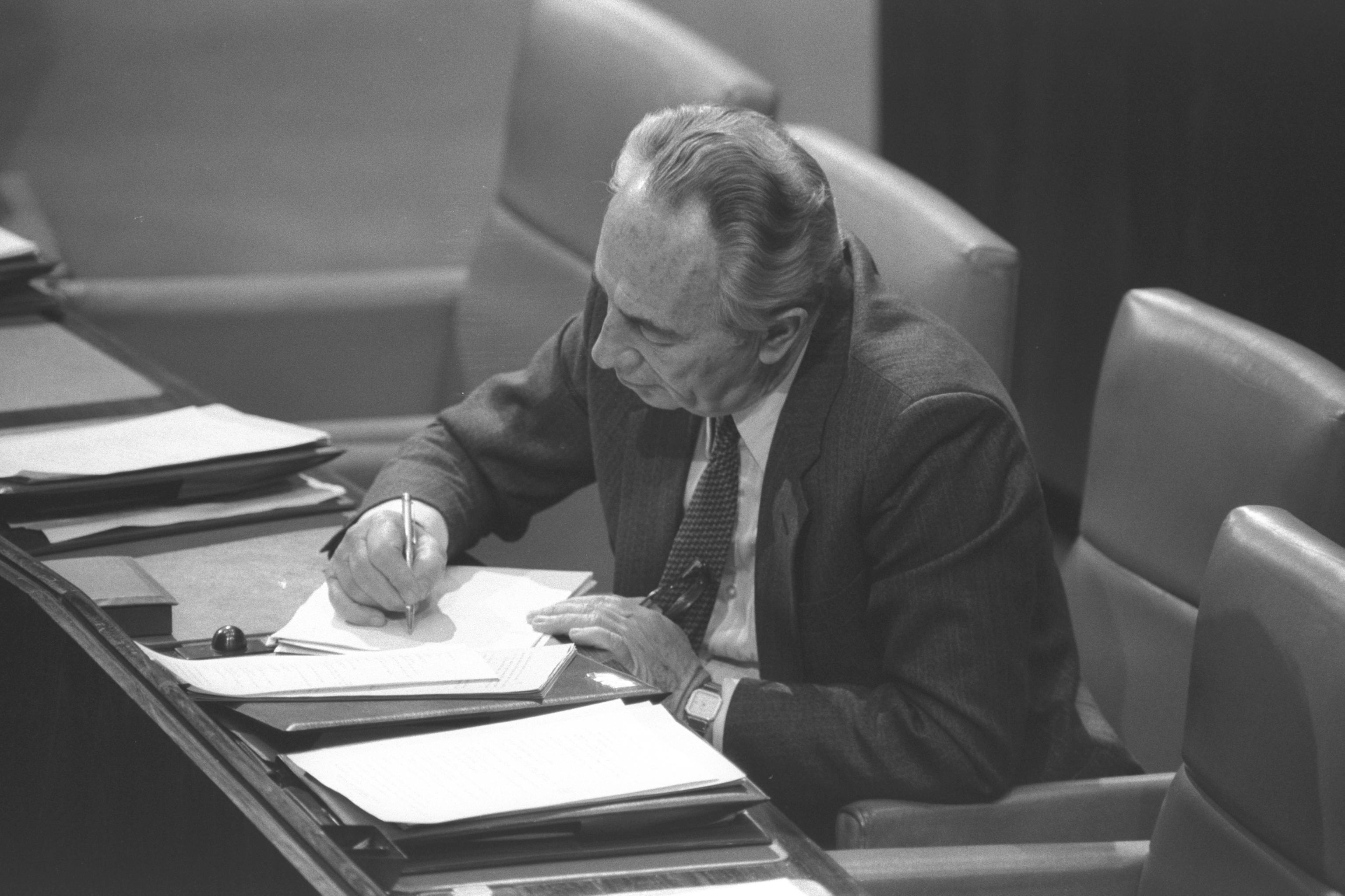 Prime Minister Shimon Peres takes notes in his seat in the Knesset. ראש הממשלה שמעון פרס במליאת הכנסת בירושלים. Photo: HARNIK NATI, 02/03/1986